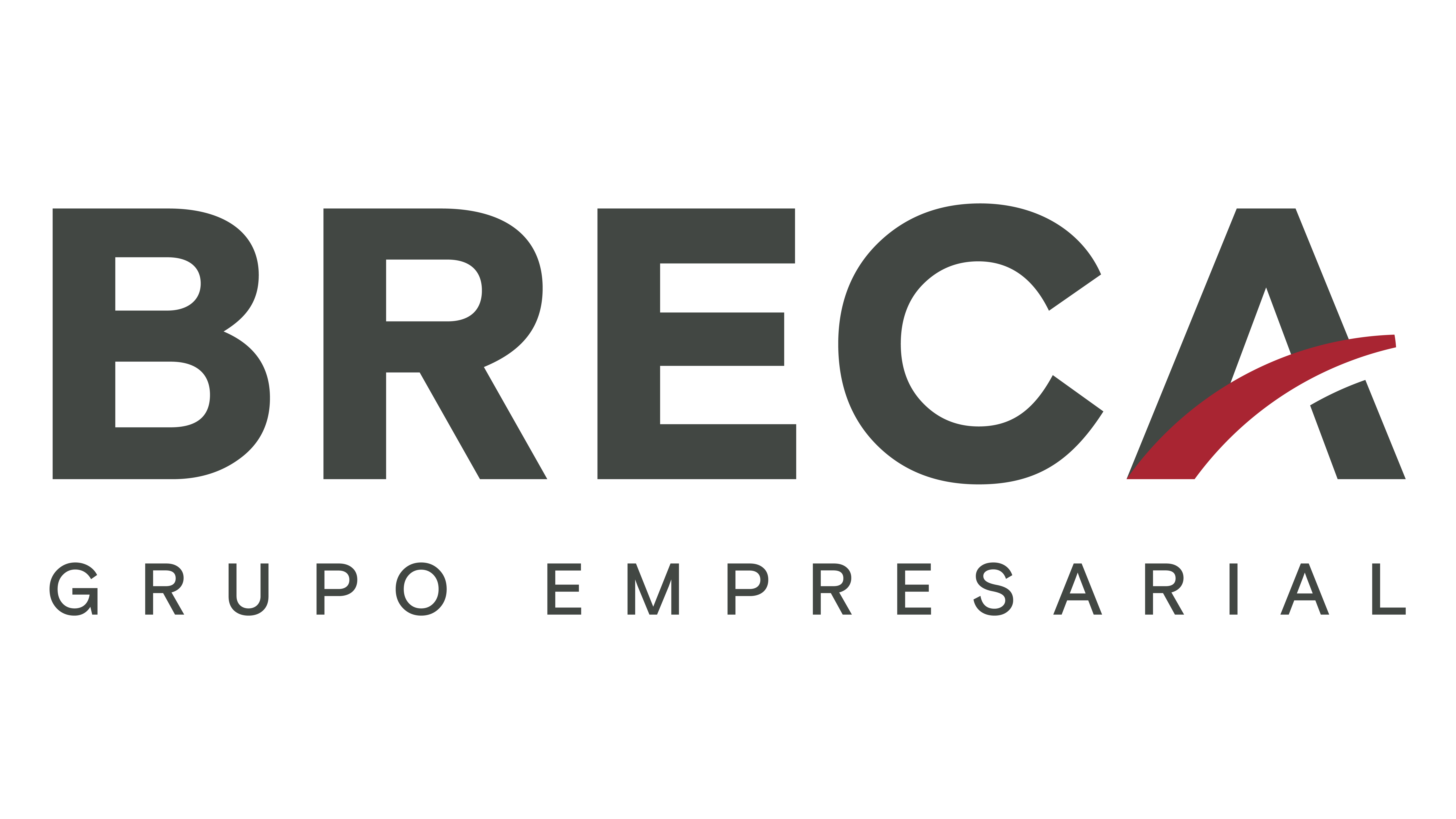 Logo Breca